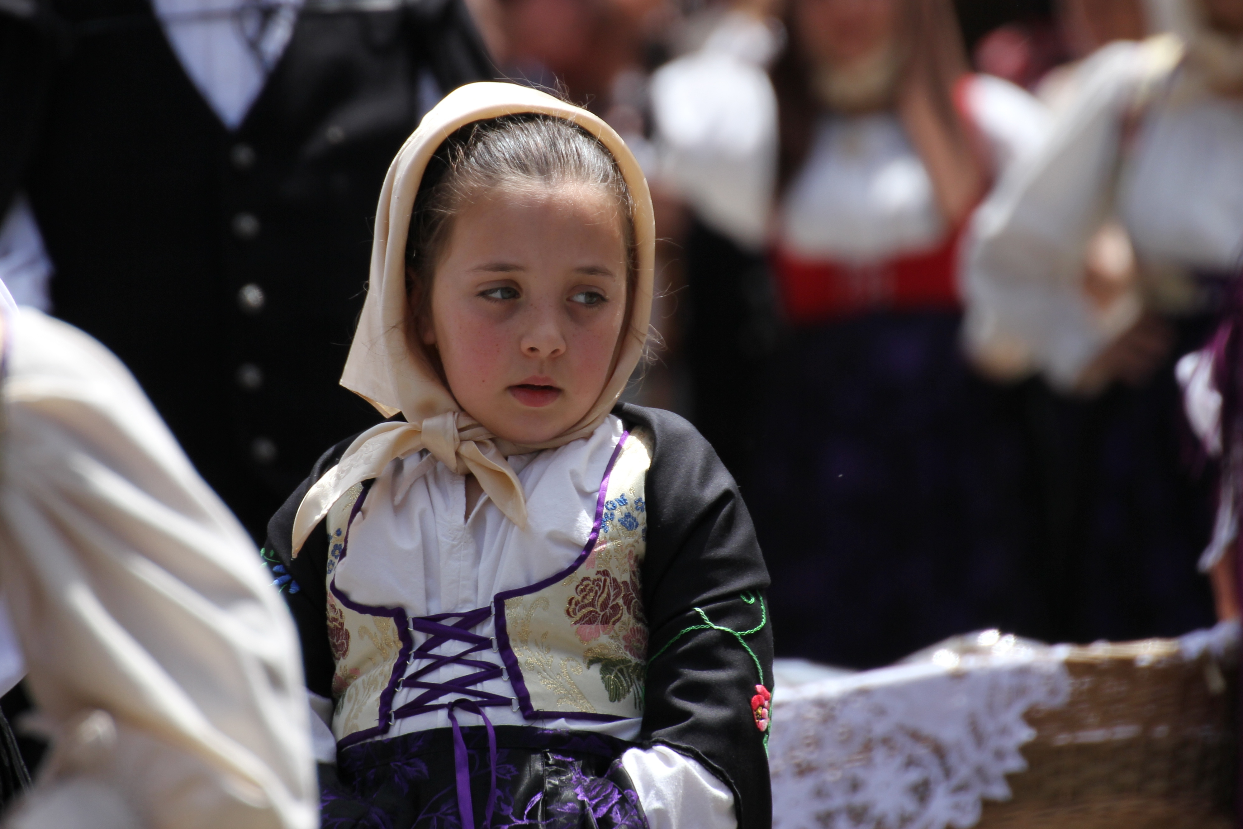 Costume tradizionale